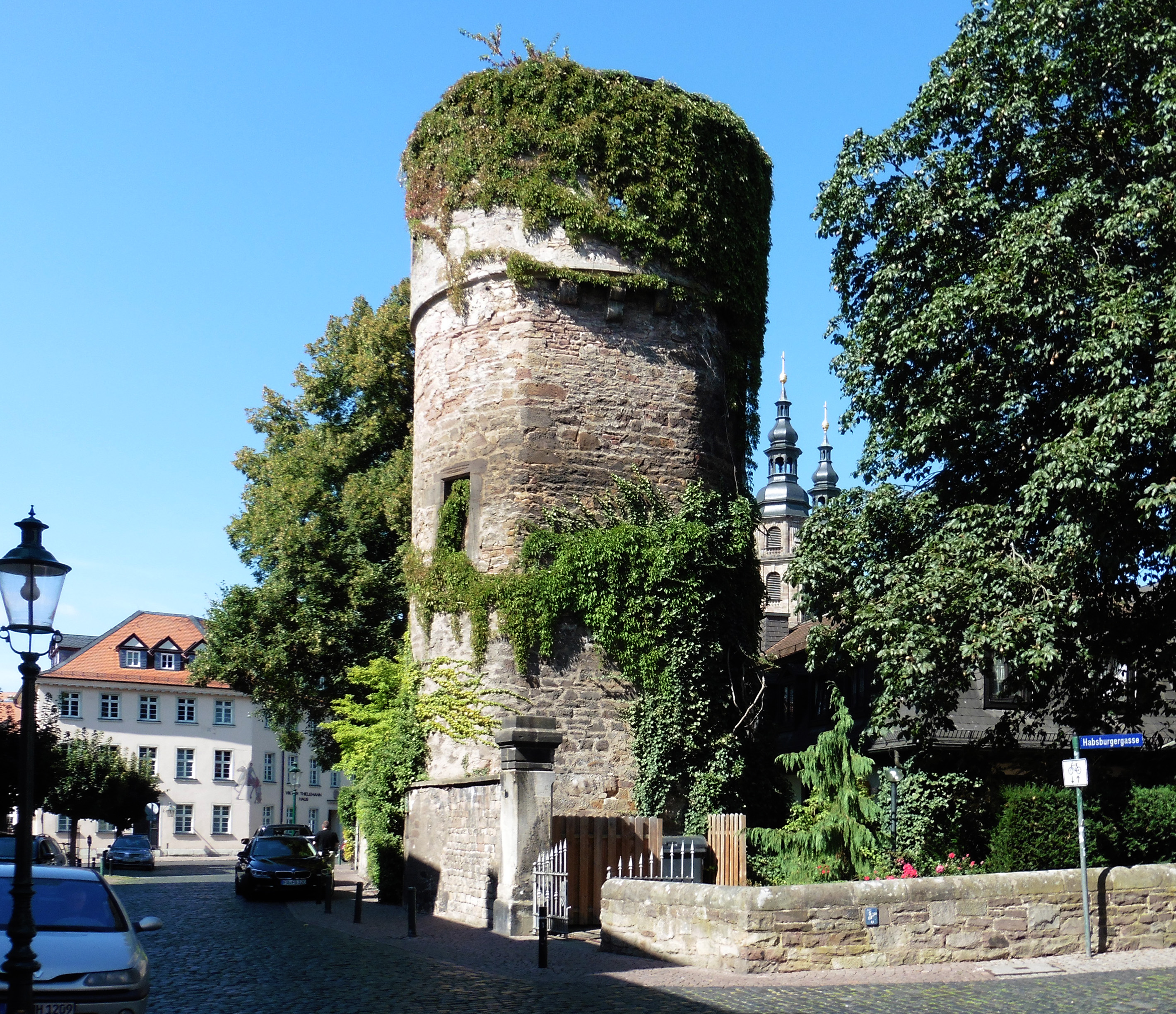 Hexenturm in Fulda. Ansicht von Südosten.